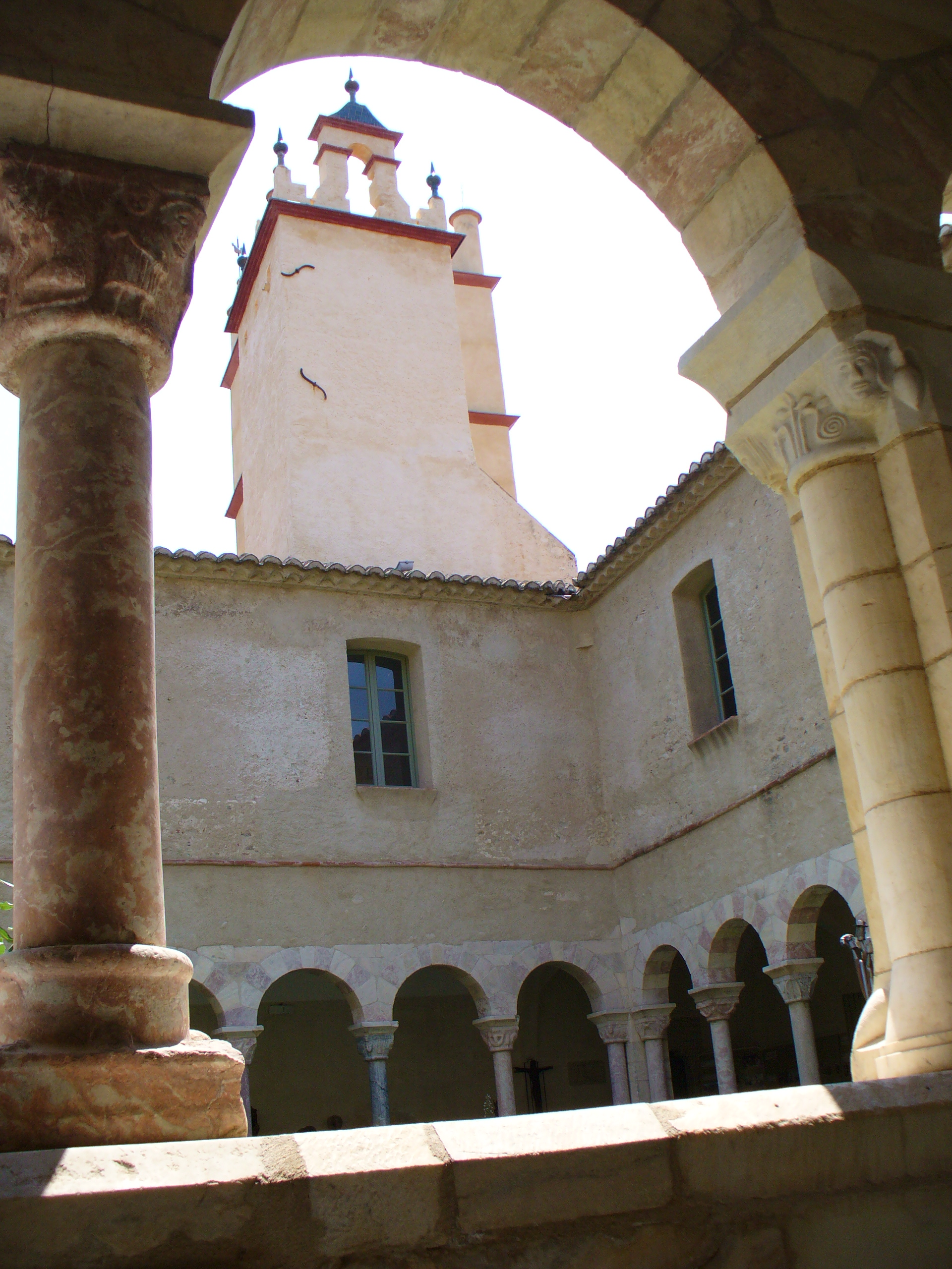 Kirchturm der Abteikirche St.Michel